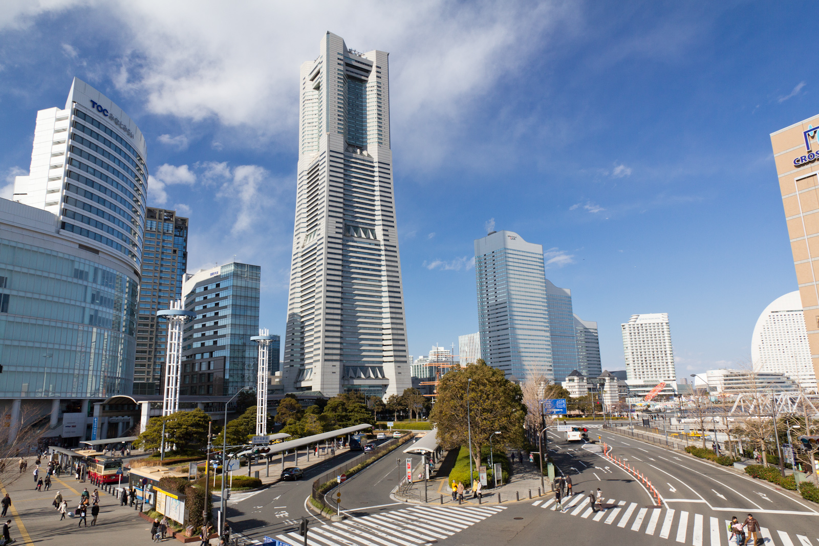 桜木町駅前 / St. Sakuragi-cho